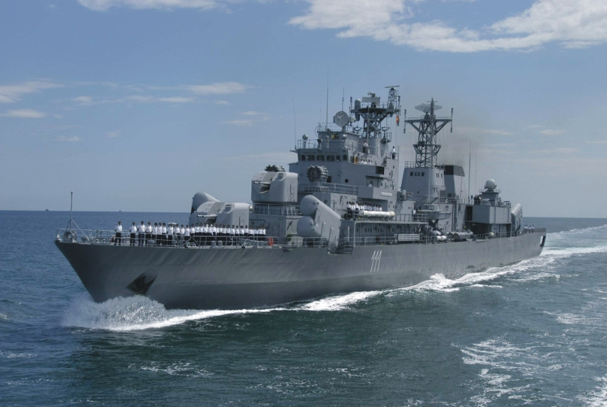 Mărășești frigate (F-111) during "Litoral 06" exercise.